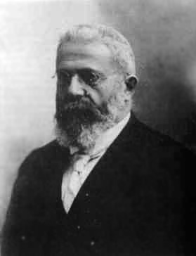 Nicodemo Jadanza (1847-1920), geodeta, topografo e cartografo italiano